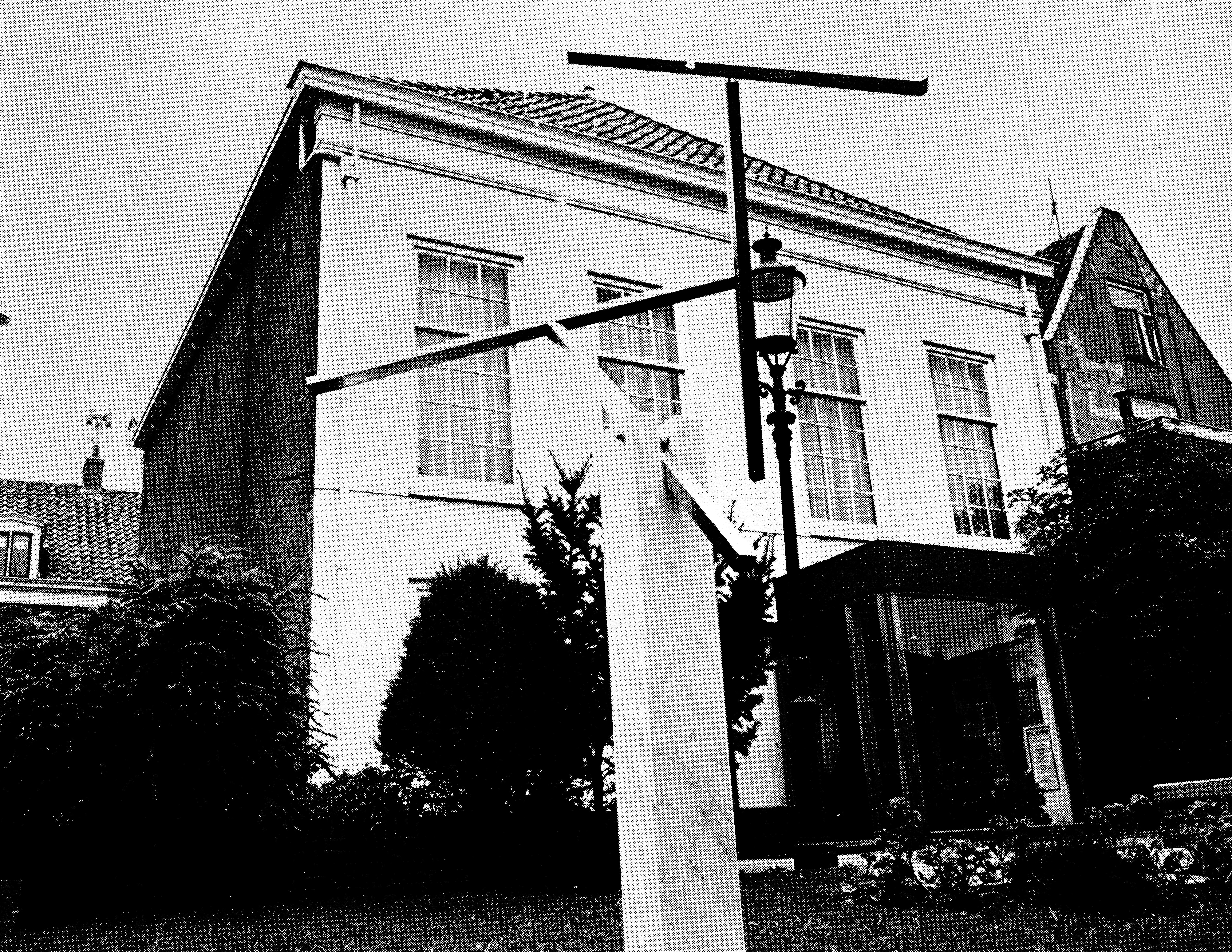 Gemeentemuseum Maassluis, van voor de verbouwing en koppeling